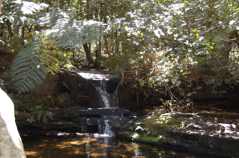 Imagen captada por aficionados pirayuenses. Derecho Liberado